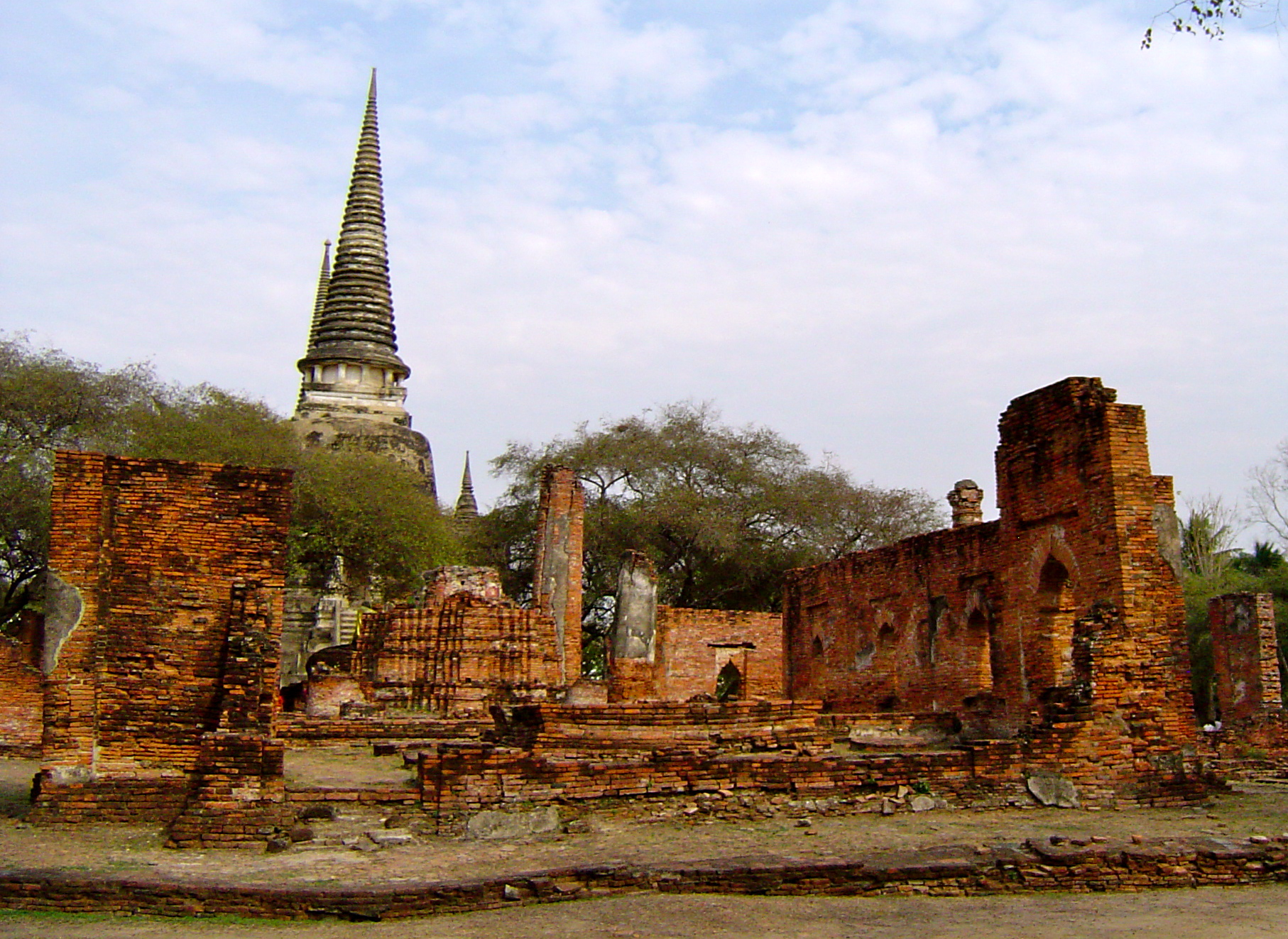 ภาพถ่ายสถานที่ภายในพระราชวังหลวงหรือพระราชวังโบราณ